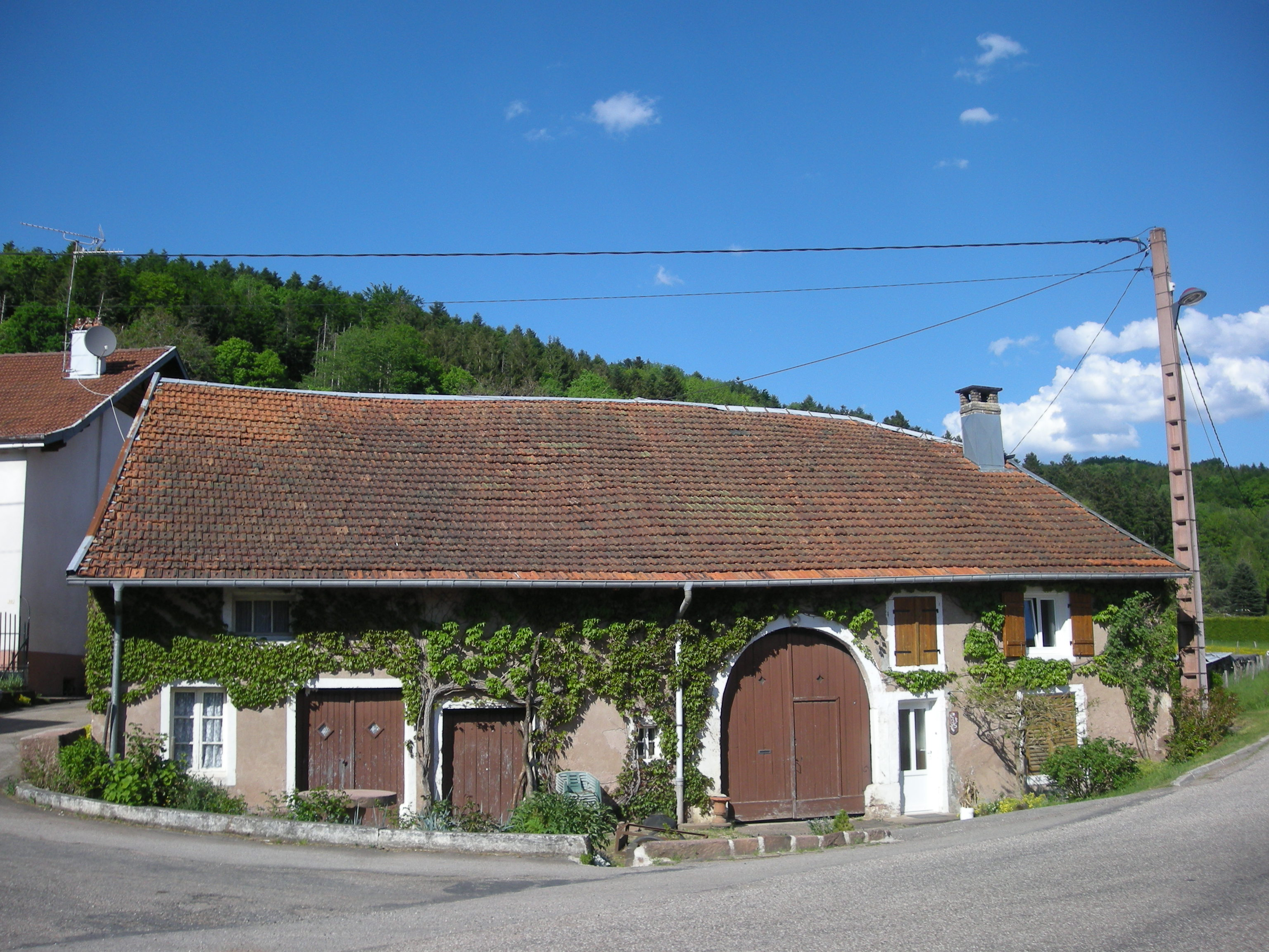 Habitat vosgien à Denipaire (Vosges)